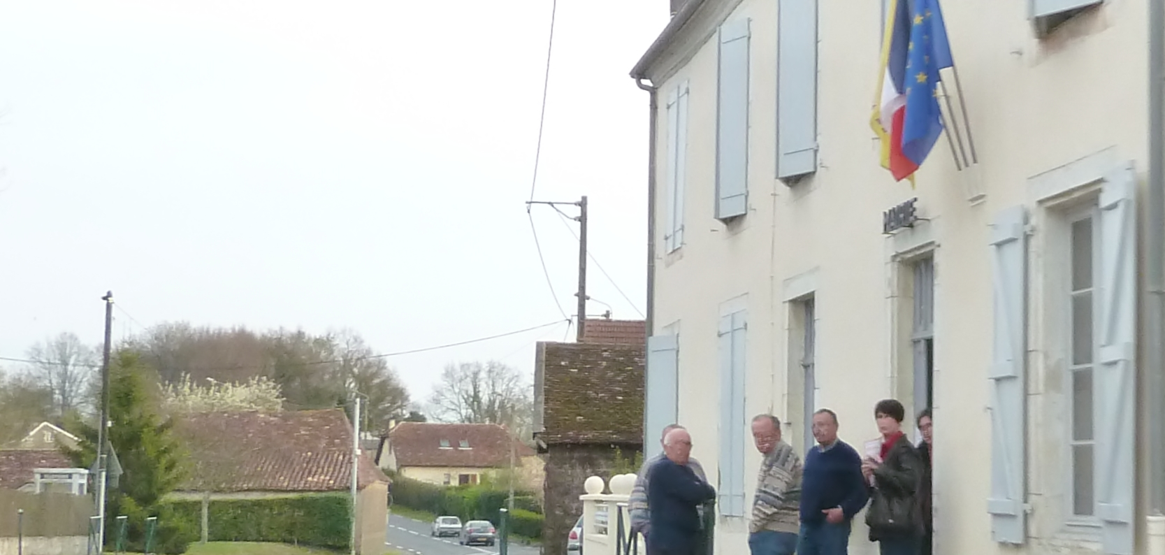 Mairie de Méracq